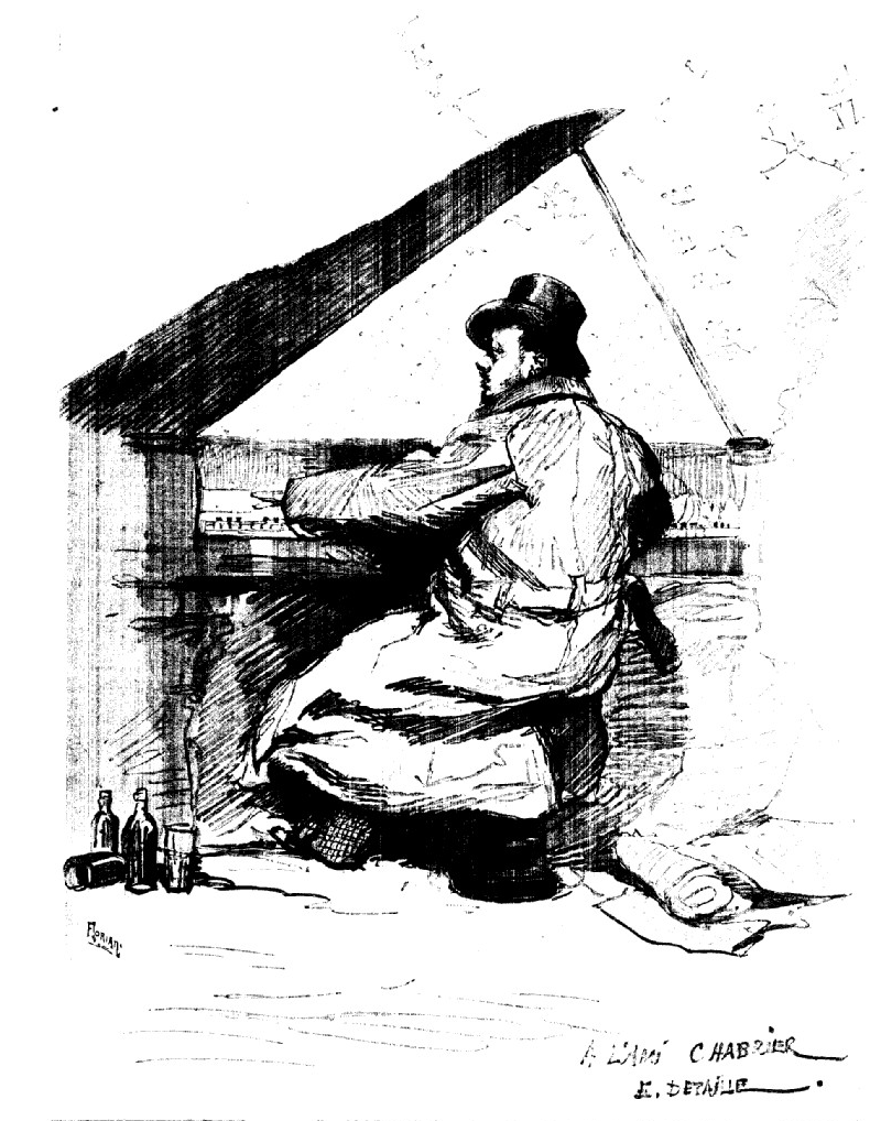 Dessin représentant le compositeur français Emmanuel Chabrier réalisé par Édouard Detaille paru dans la Revue Illustrée du 15 juin 1887